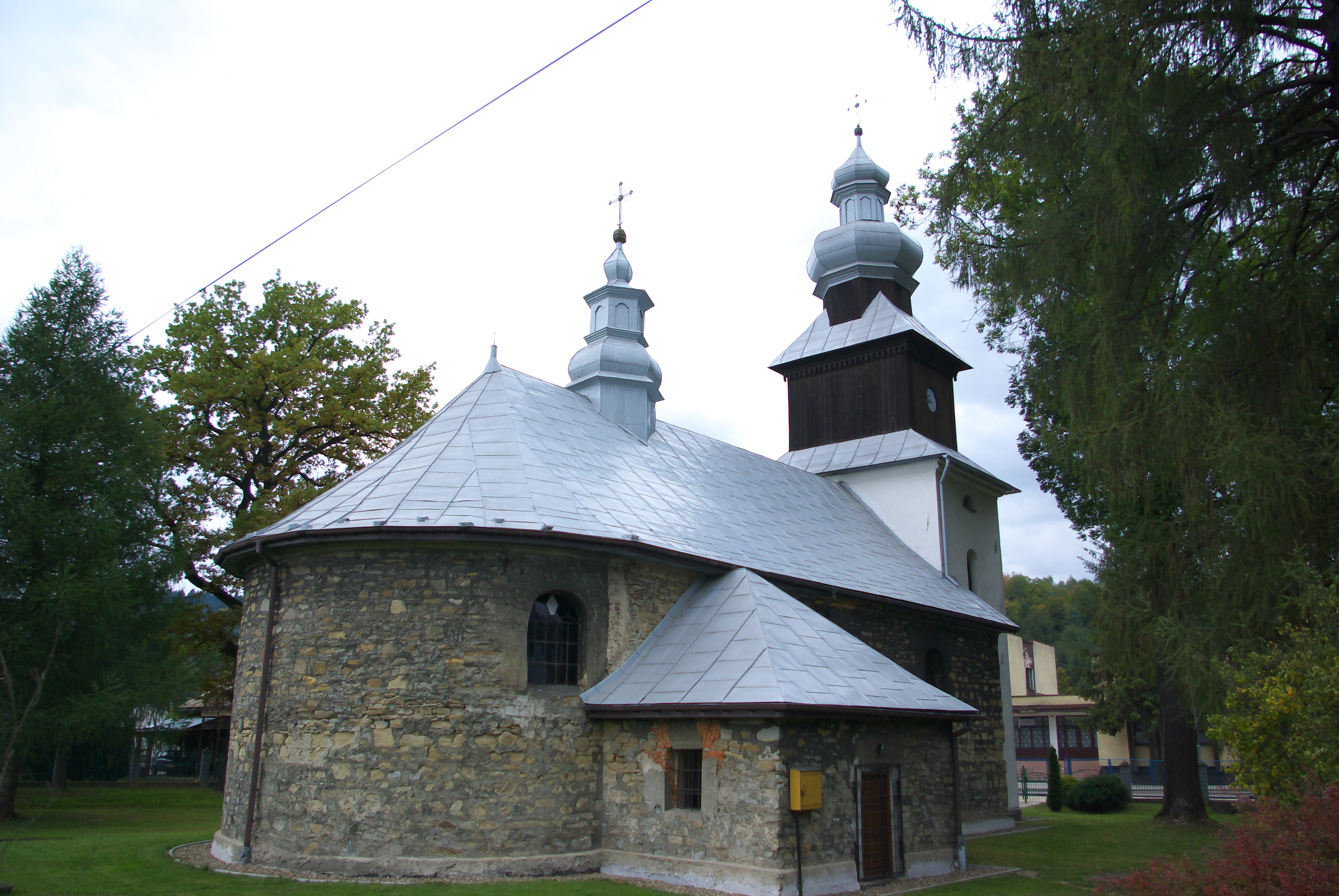 Cerkiew św. Michała Archanioła w Zagórzu.